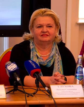 Наталья Степановна Глухова - генеральный директор Самарского академического театра оперы и балета, заслуженный работник культуры России. Пресс-конференция перед премьерой оперы "Борис Годунов" летом 2012 года.